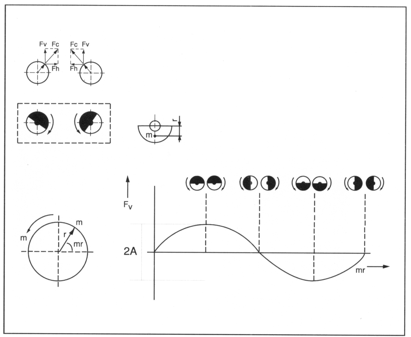 Principe de fonctionnement d'un vibrateur, documentation ICE-France